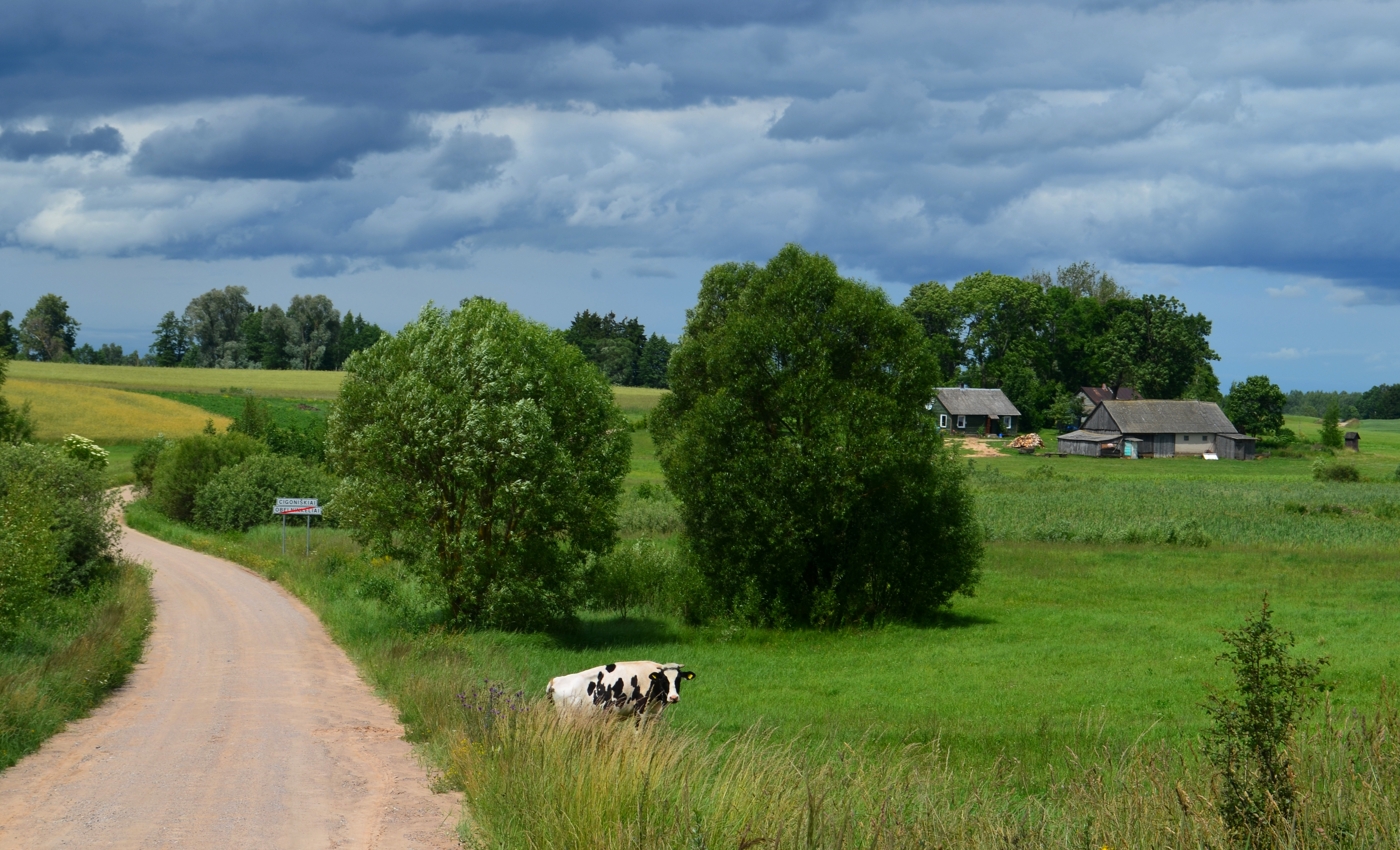 Cigoniškiai, Alytaus raj.